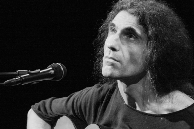 Наумов Юрий